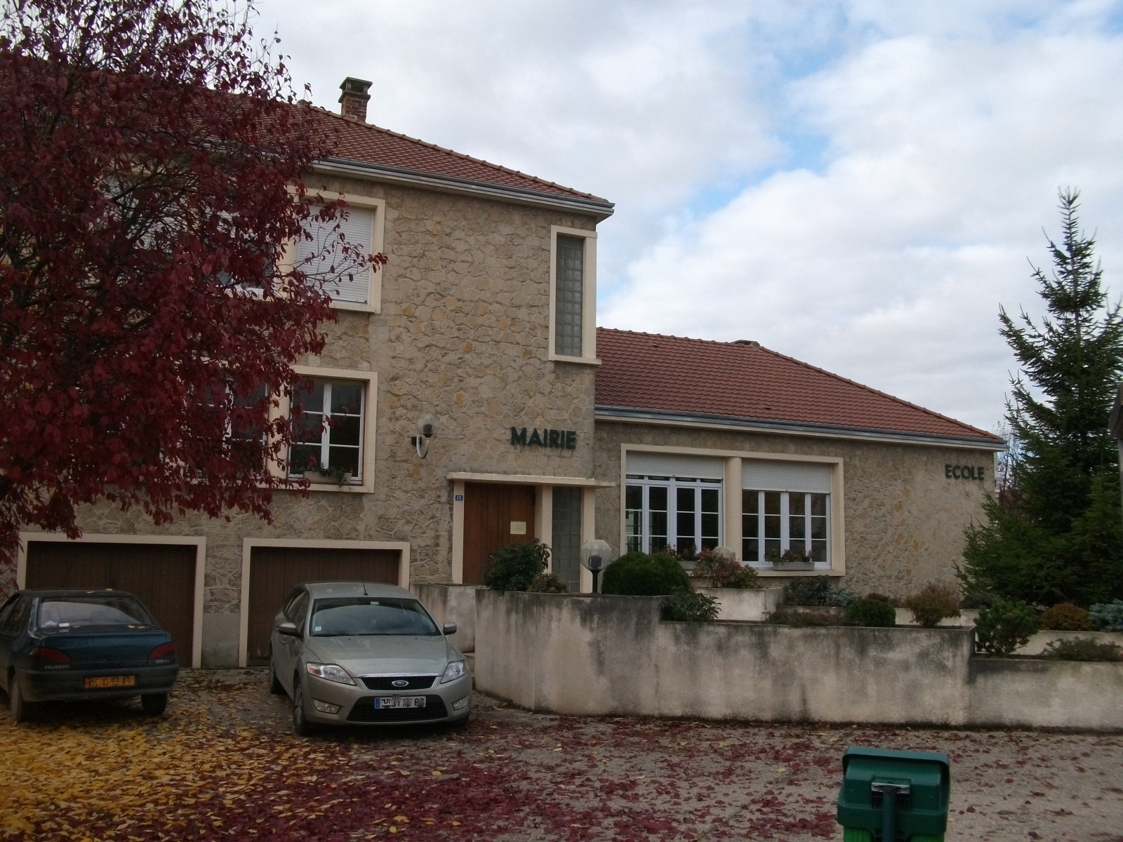 mairie et école de Vadenay.